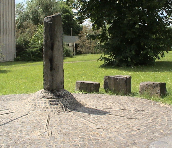 Kanizsai László: OMBKE emlékoszlop a Miskolci Egyetemen (1992)